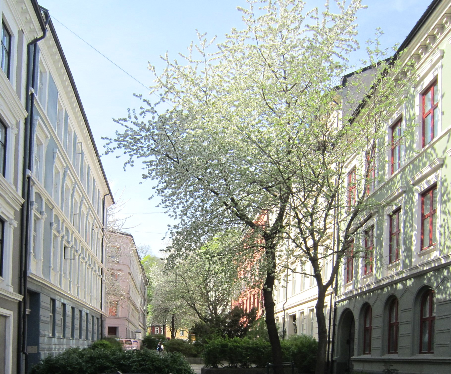 Iduns gate i Oslo